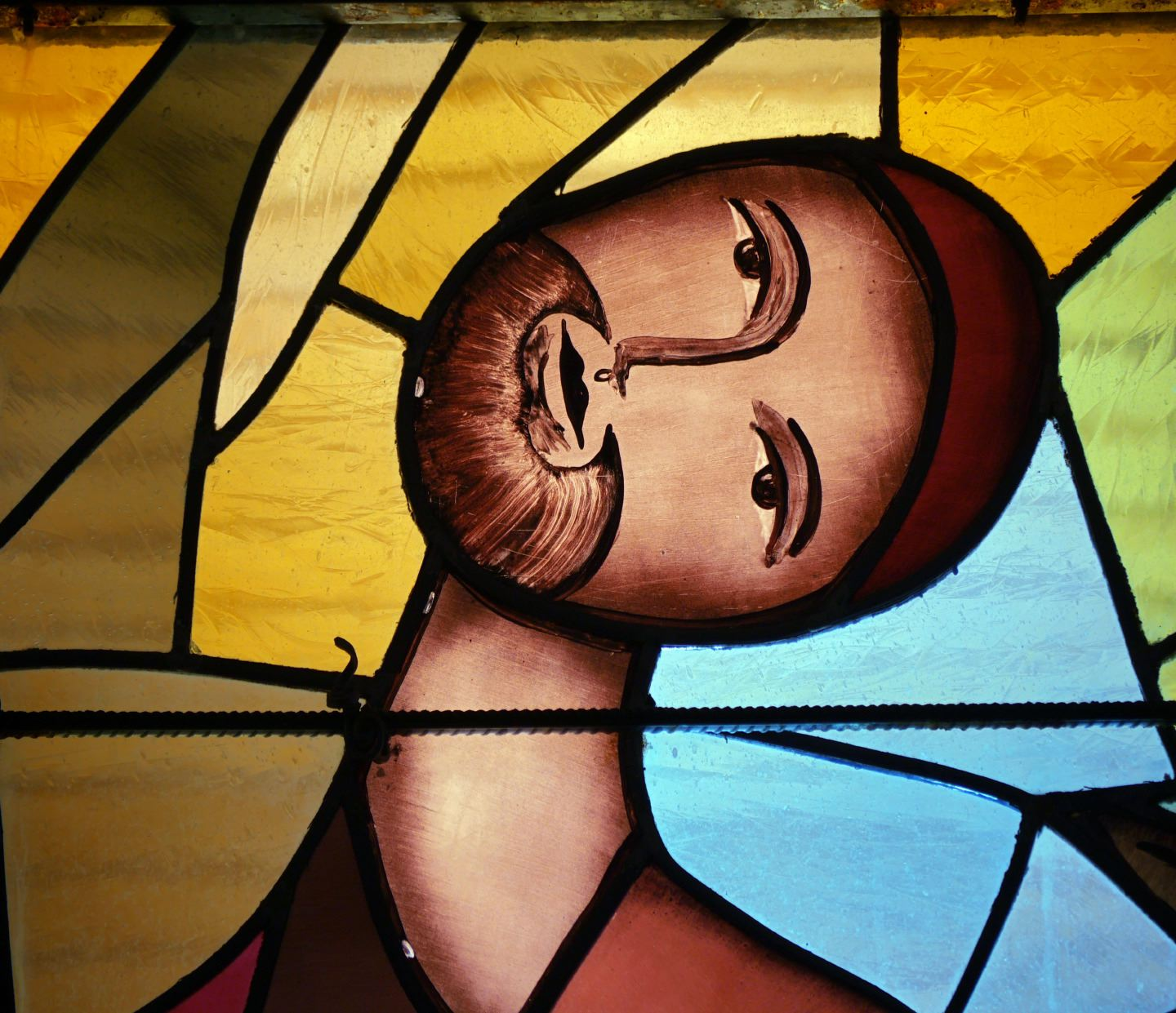 Vitraux de l'Eglise de Saint-Joseph par Guy Lefèvre